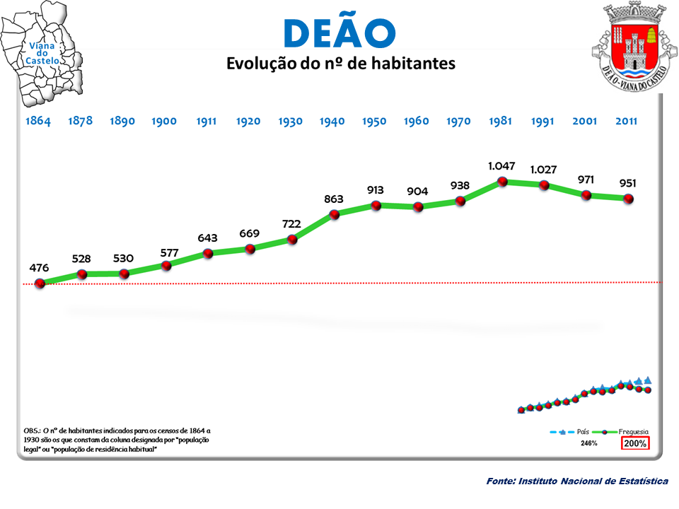 Censos 1864/2011